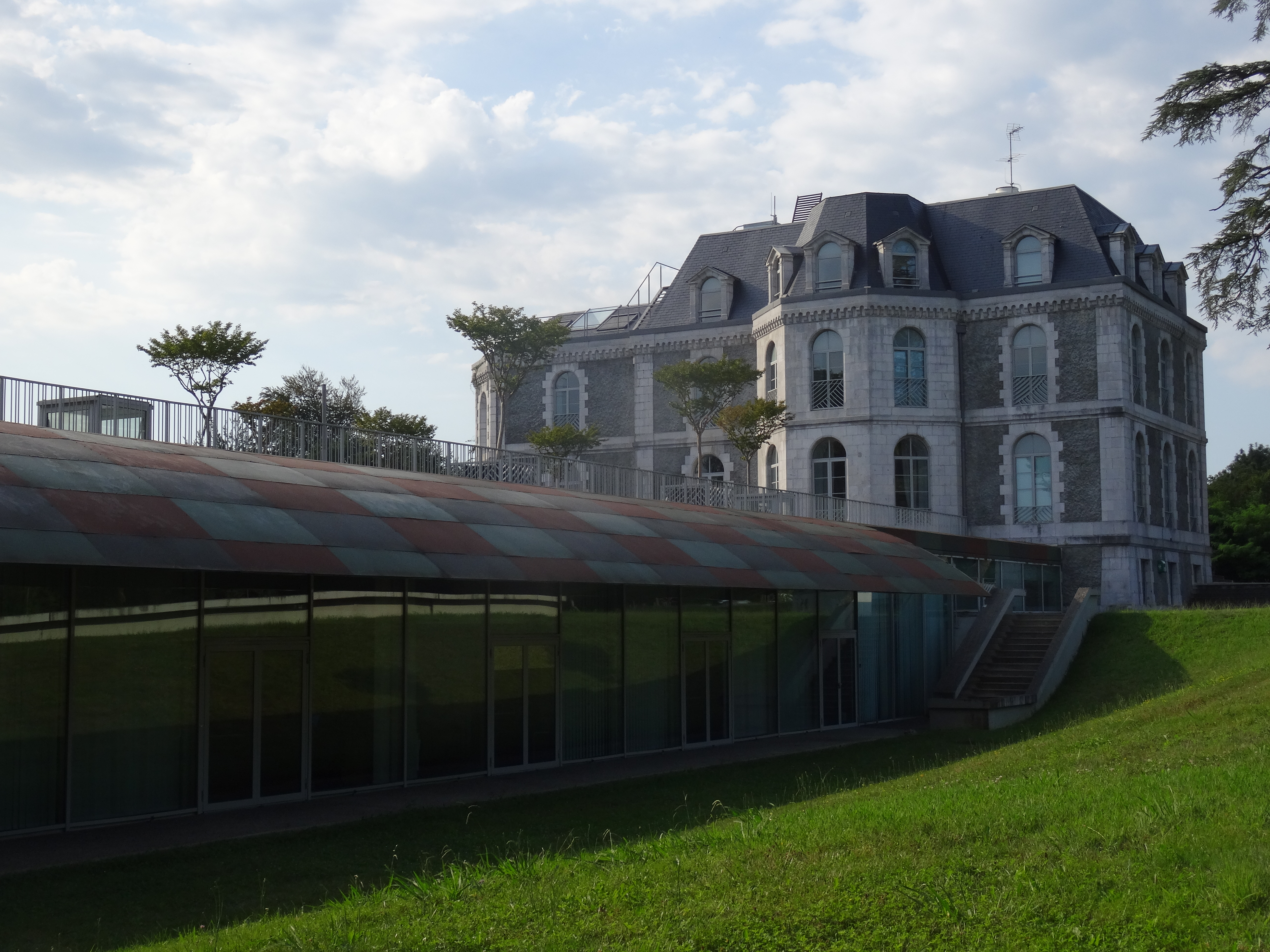 Hôtel de Ville (château du Bilaà) de Lescar.